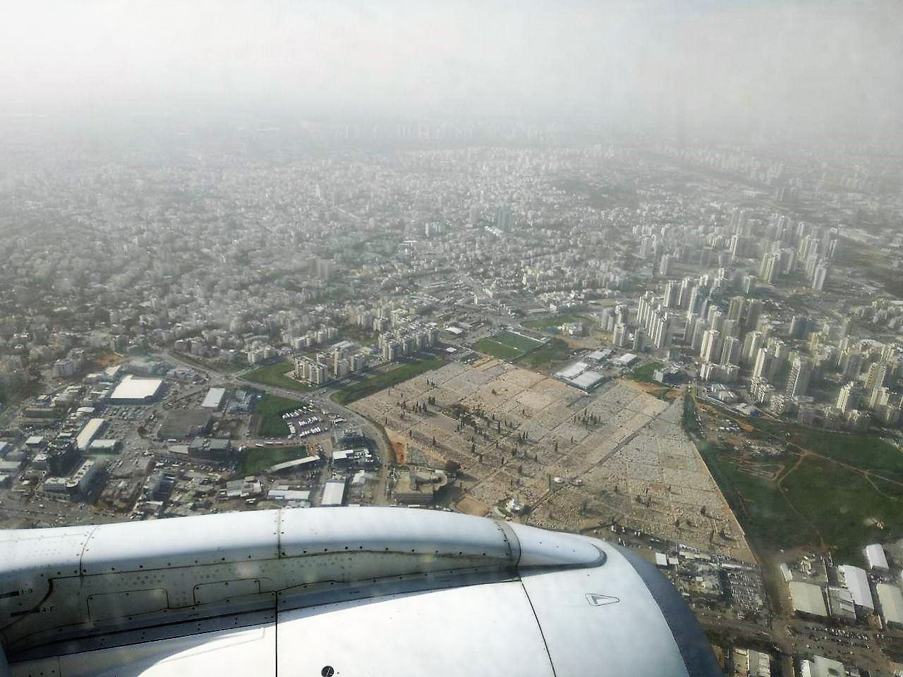 צילום אוויר של בית העלמין סגולה בפתח תקווה